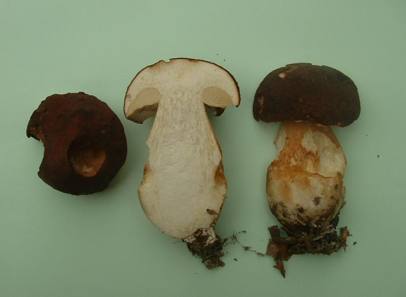 Bolet tête de nègre (Boletus aereus), Étrelles-et-la-Montbleuse (Haute-Saône, France)., octobre 2004.